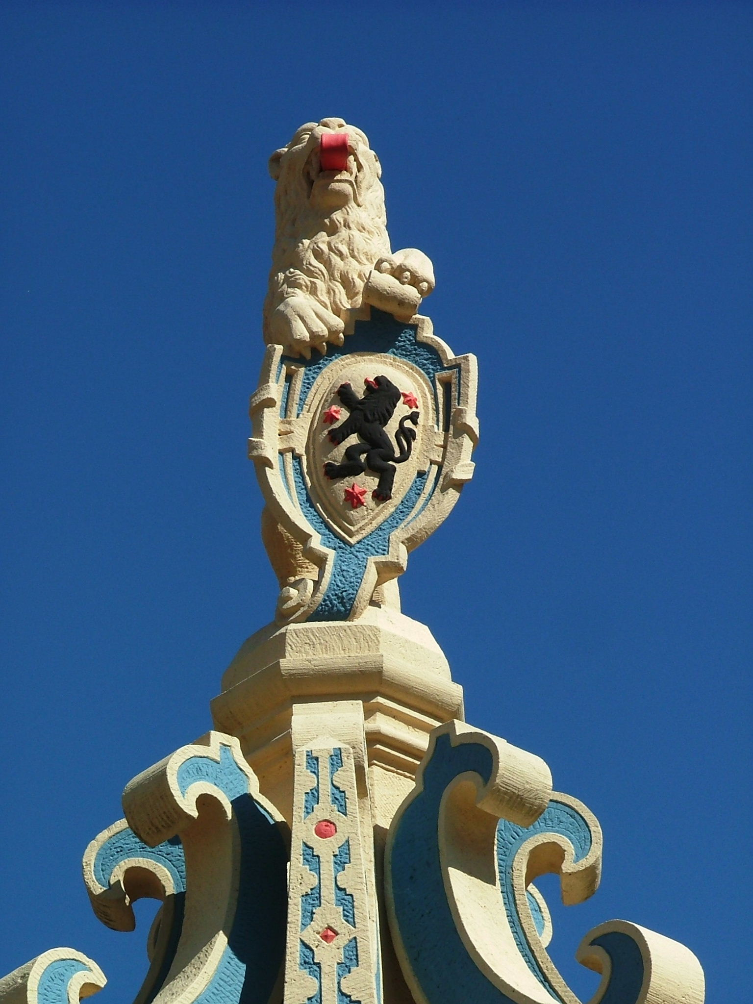 Das Oschatzer Wappentier, der Löwe, auf dem Brunnen (auf dem Neumarkt) von Oschatz / Sachsen (selbst fotographiert)